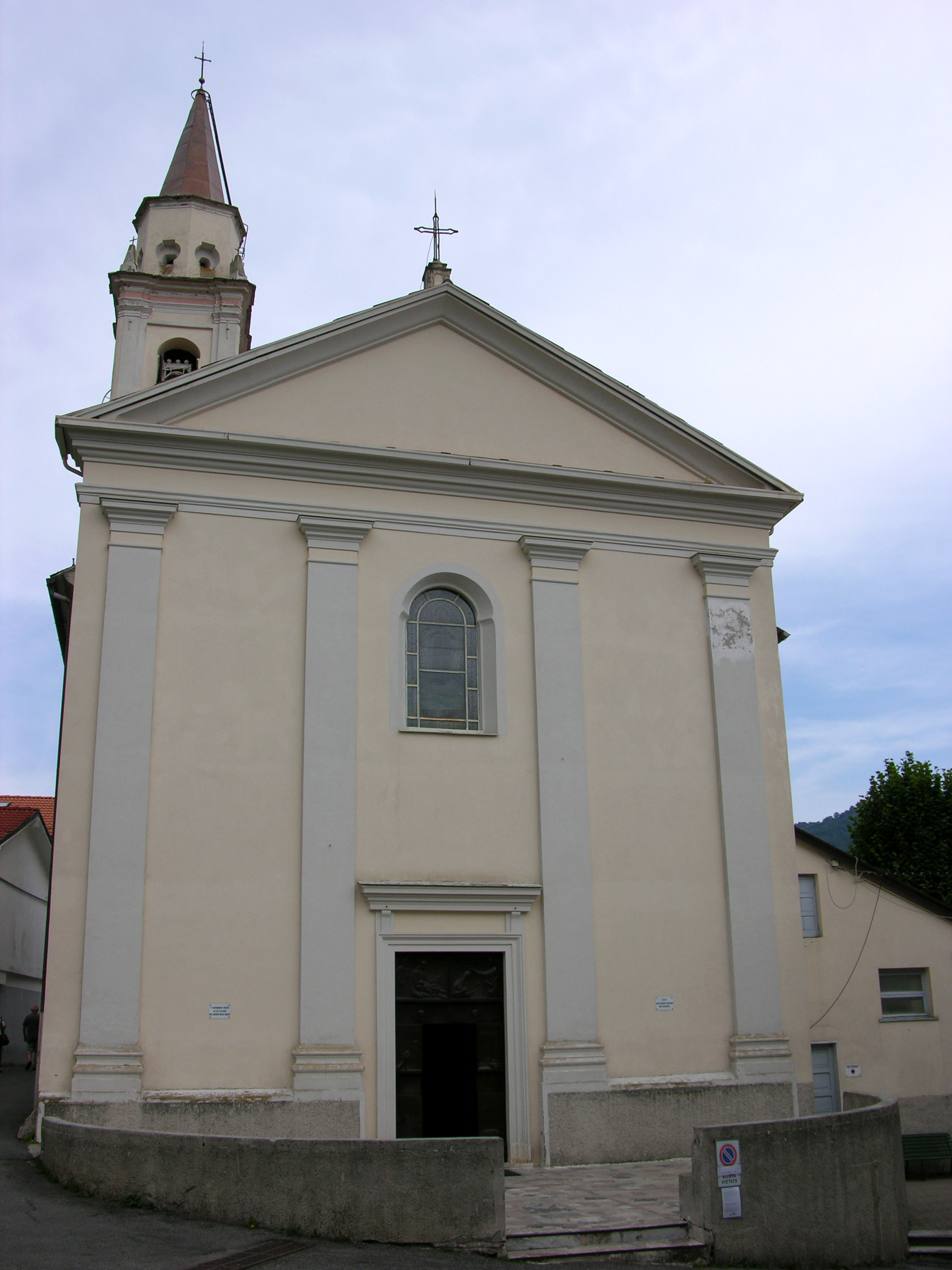 Chiesa della Beata Vergine Addolorata, Gorreto, frazione Fontanarossa (GE) Italy.